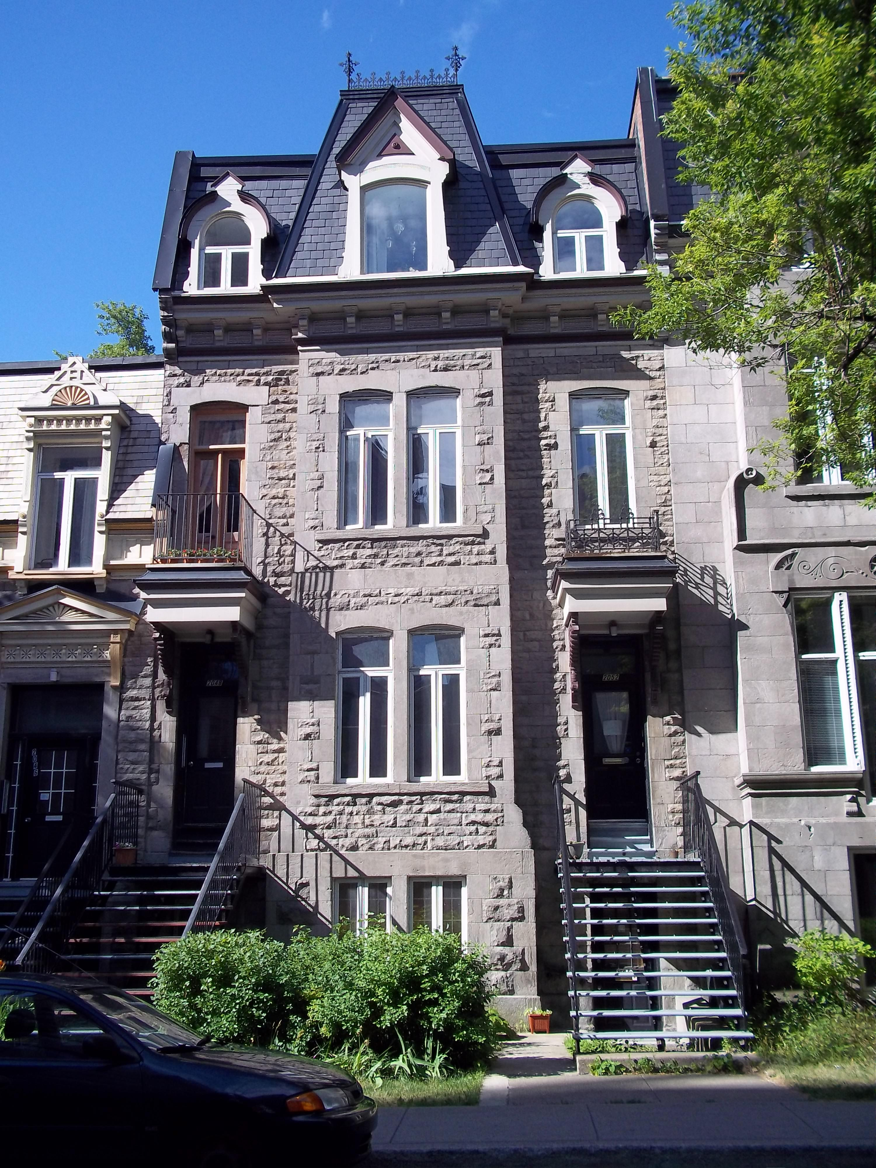 Maison Andreas C. F.-Finzel, 2050, rue Jeanne-Mance, Montréal